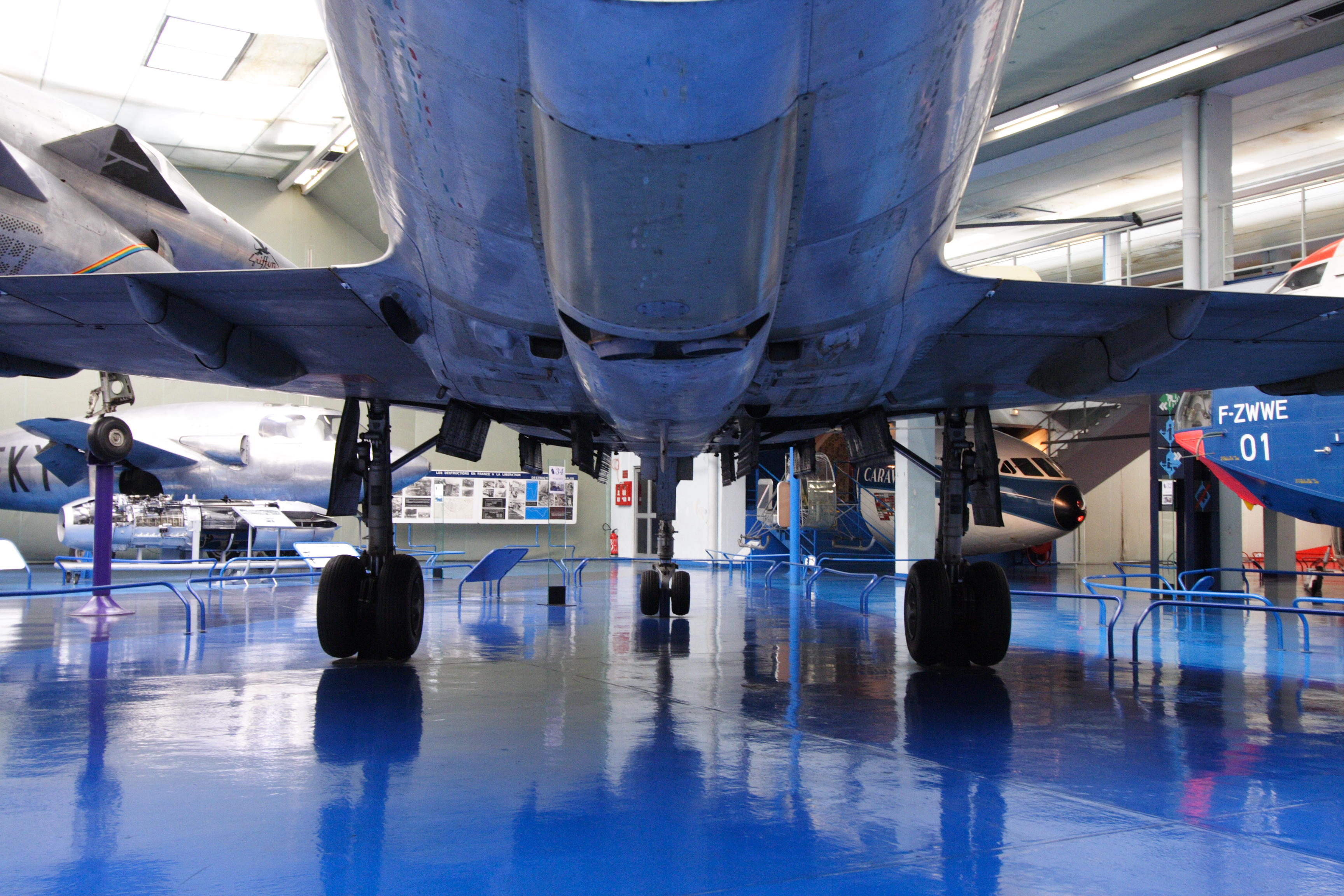 French experimental aircraft Mirage III.V (Musée de l'air et de l'espace, Le Bourget, France)